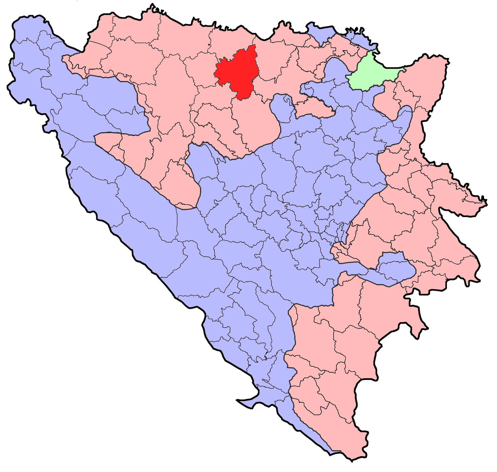 Republika Srpska (BiH) municipality